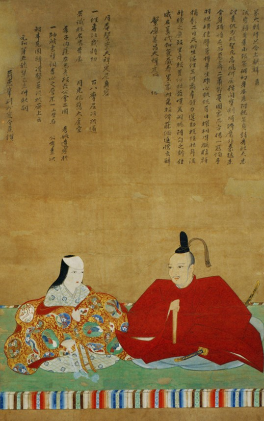 内藤家長 (1546 - 1600) と夫人の肖像。